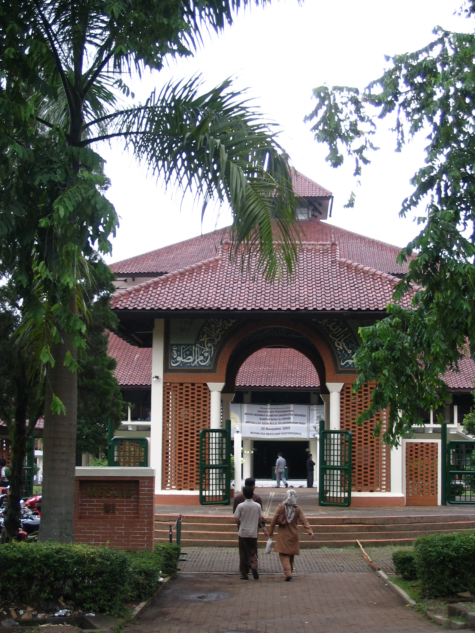 Entrada a la Mezquita Ukhuwah Islamiyah, Universidad de Indonesia, Campus de Depok, Gran Yakarta.